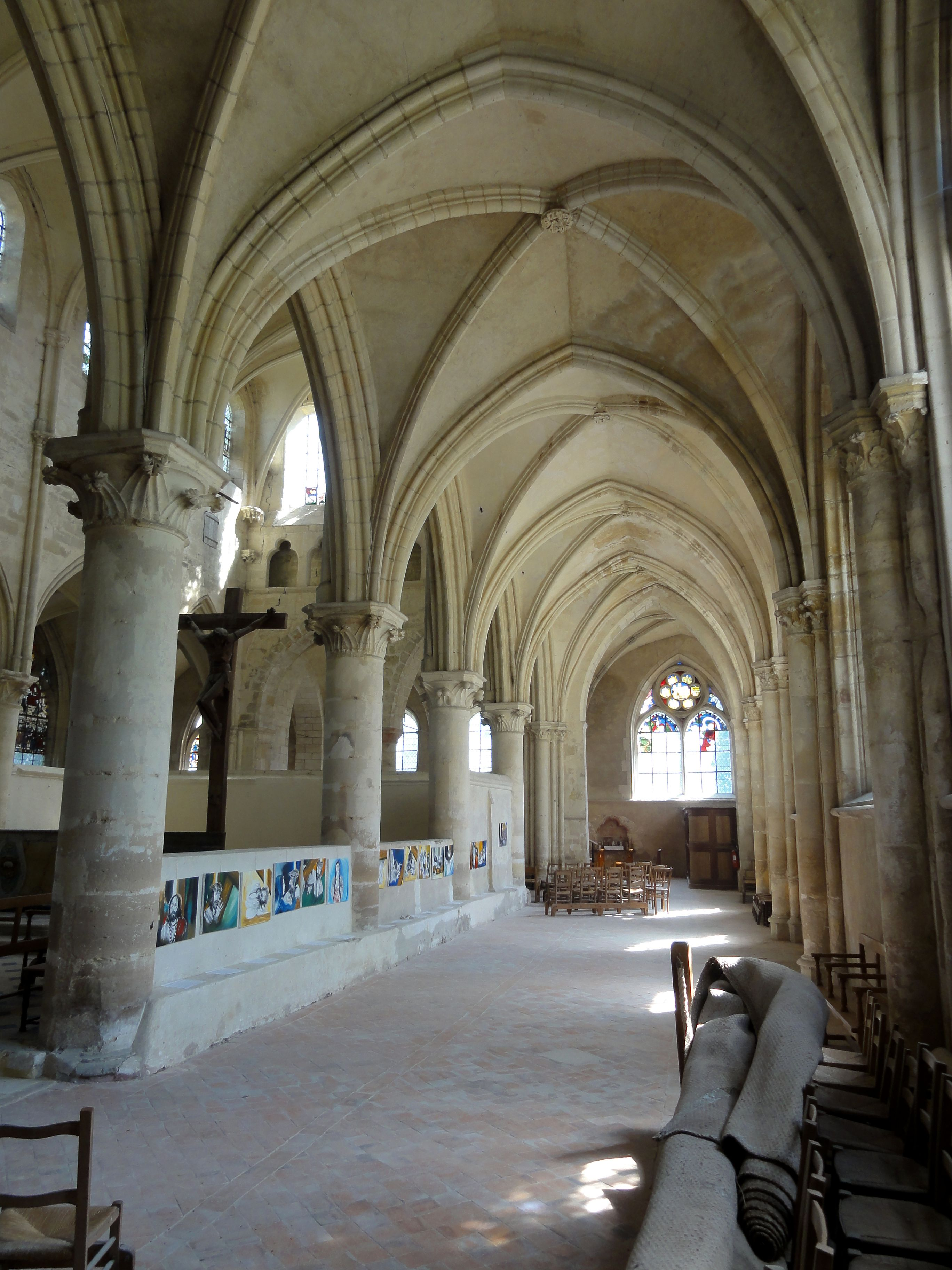 Collatéral sud du chœur, vue vers l'est.